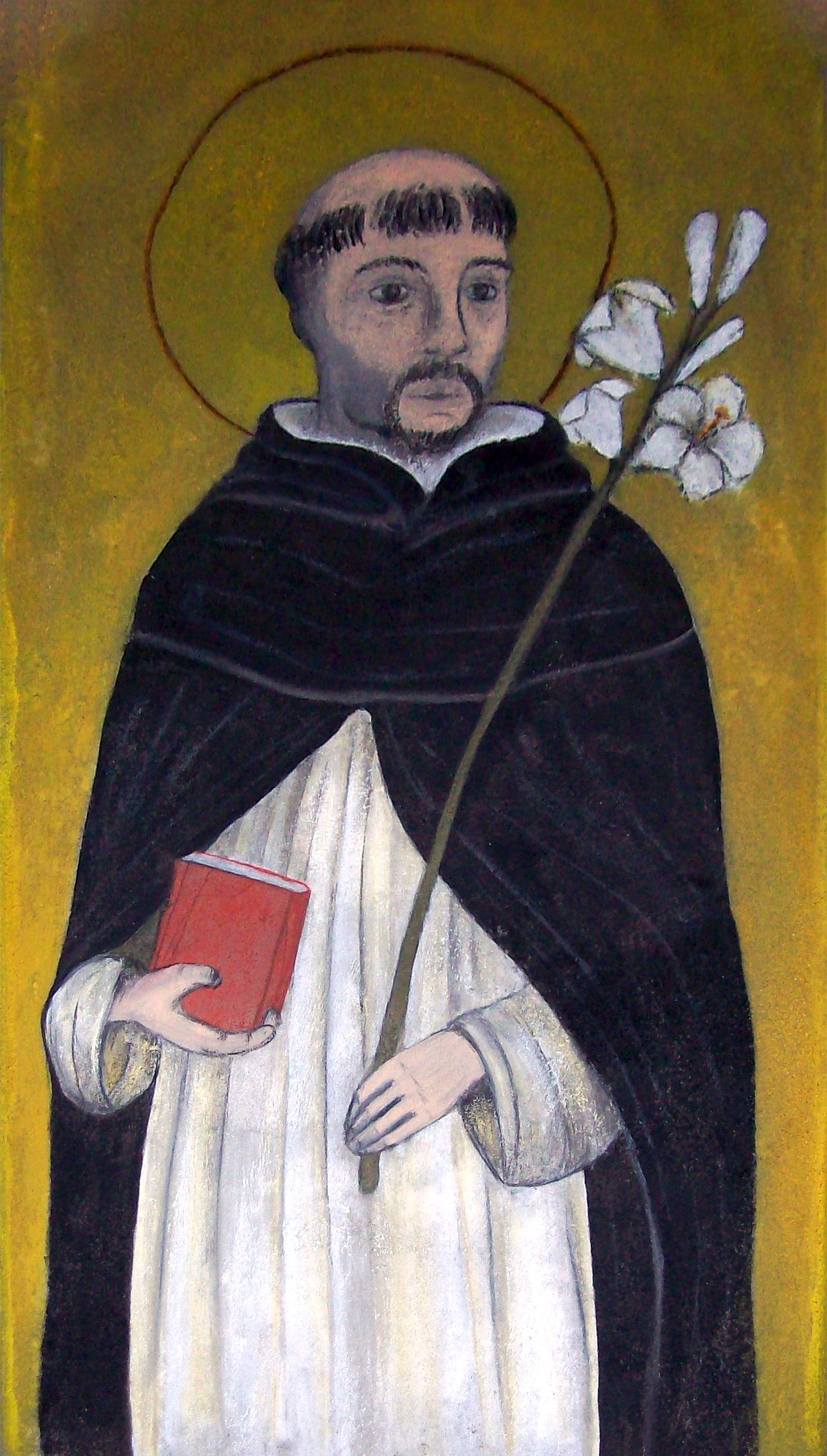 San Domenico di Guzmán affresco in un Pilone votivo di Cantarana